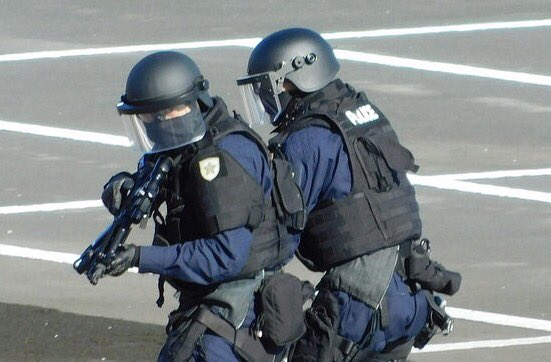 2017年の埼玉県警察年頭視閲式にて、ヘリコプターから降下後、前進するRATS隊員。